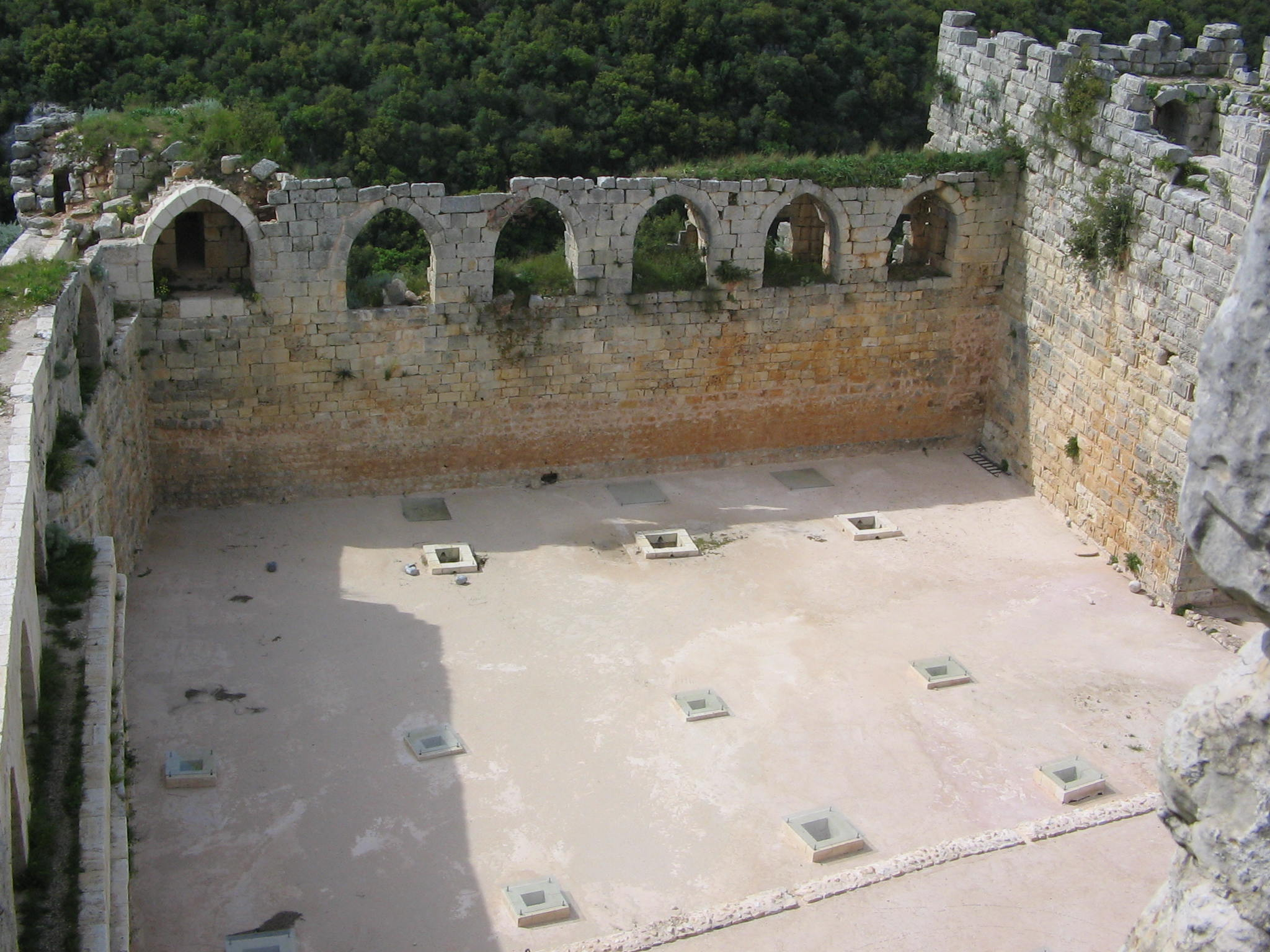 Cittadella di Saladino, insediamento all'interno della cinta muraria.